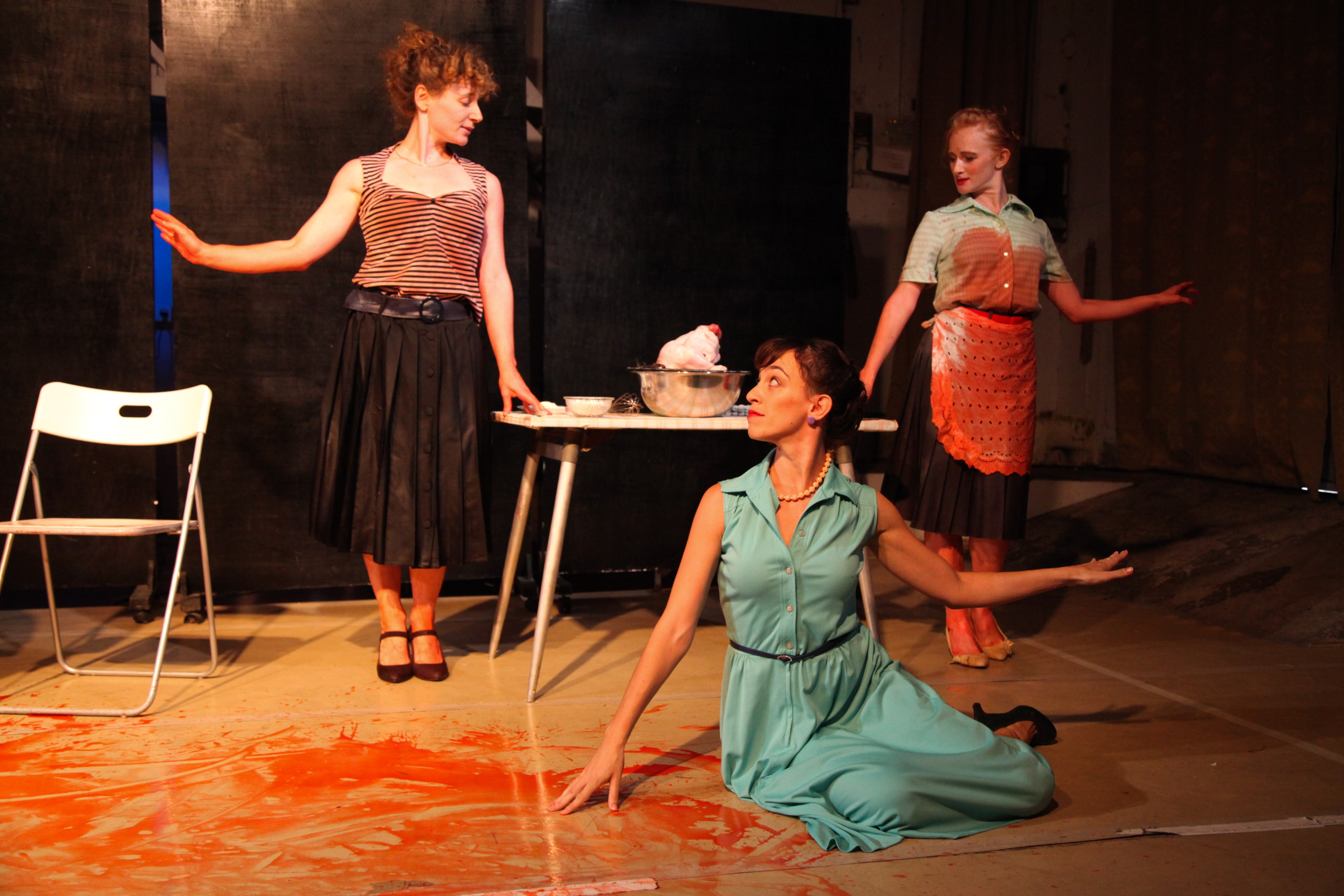 פרמיירה 2010, סדנאות הבמה